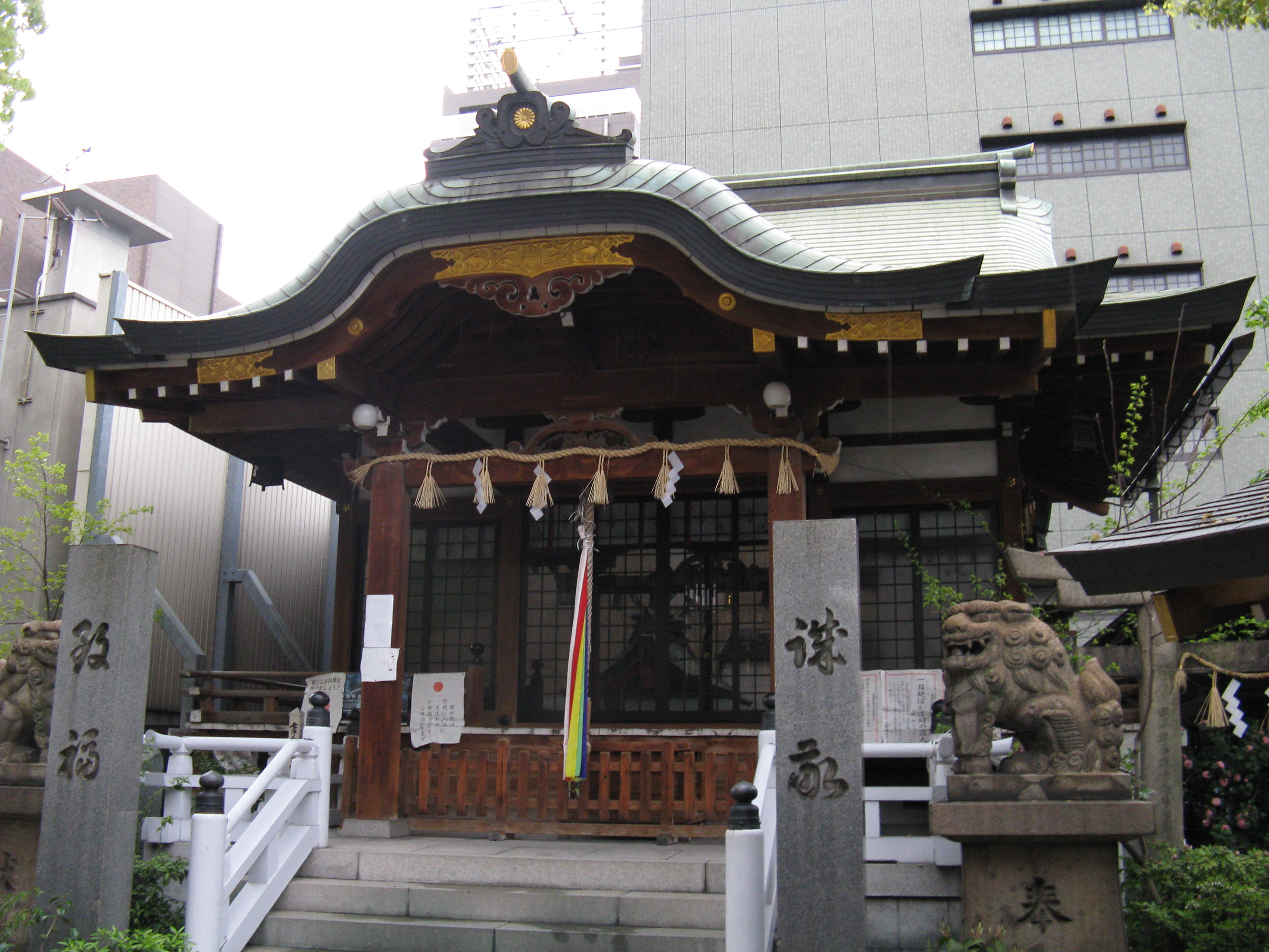 鵲森宮